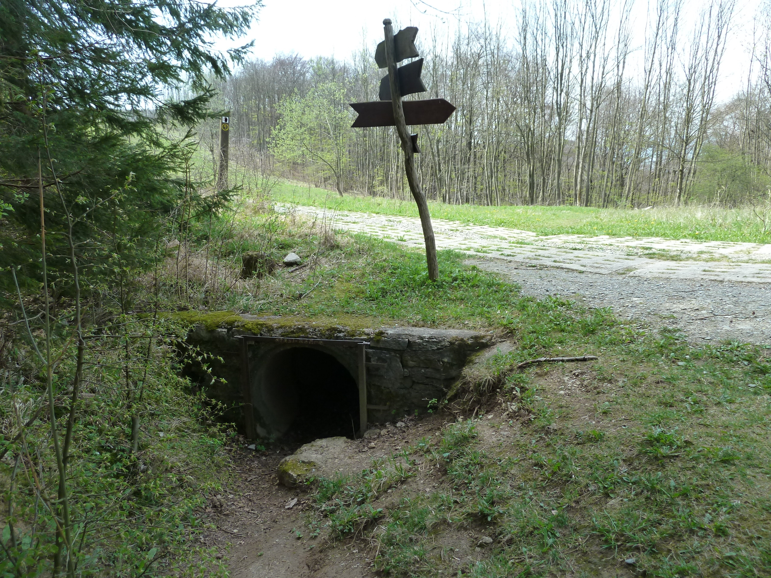 Röhre unter den DDR-Grenzbefestigungen an der innerdeutschen Grenze auf der Gobert zum Schleusen von DDR-Spionen, Osteingang vor dem Grenzzaun. Oberhalb der Röhre der ehemalige Kolonnnenweg.